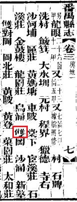 粵語: 黃埔區雙崗個雙